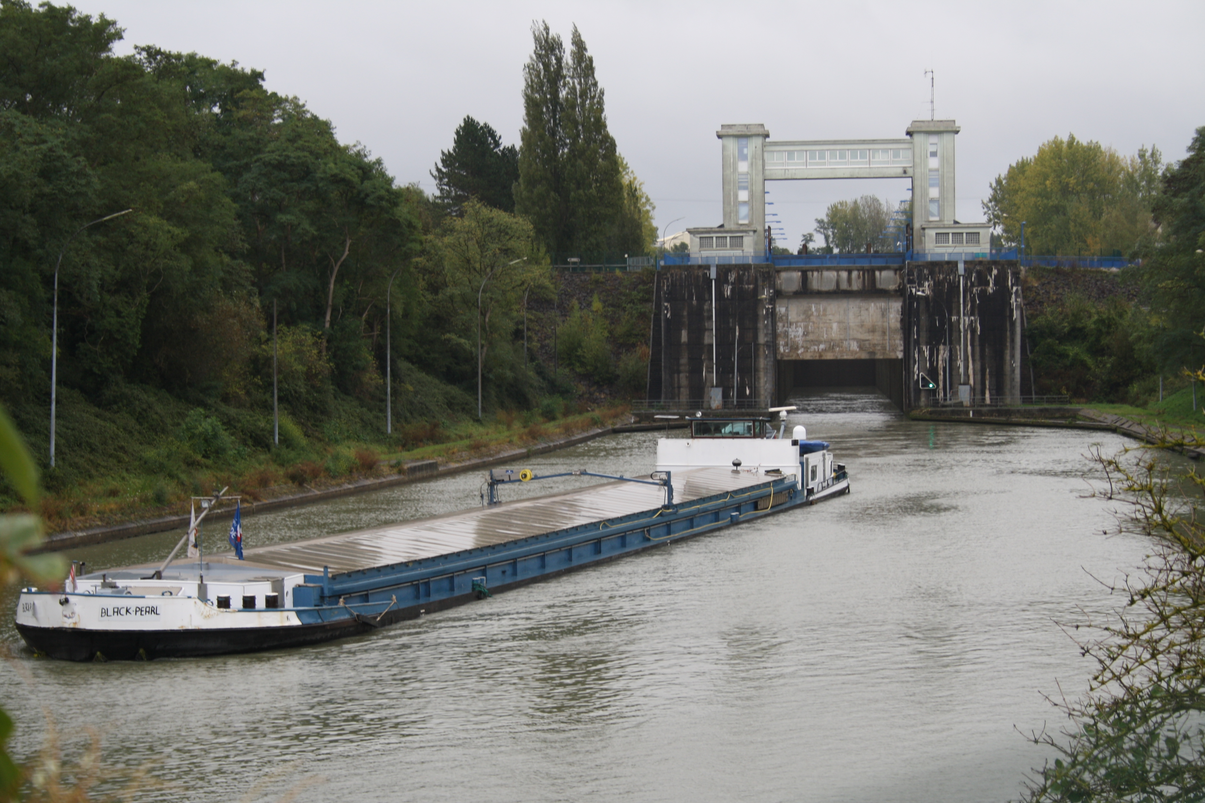 Écluse des Fontinettes près de l'ascenseur